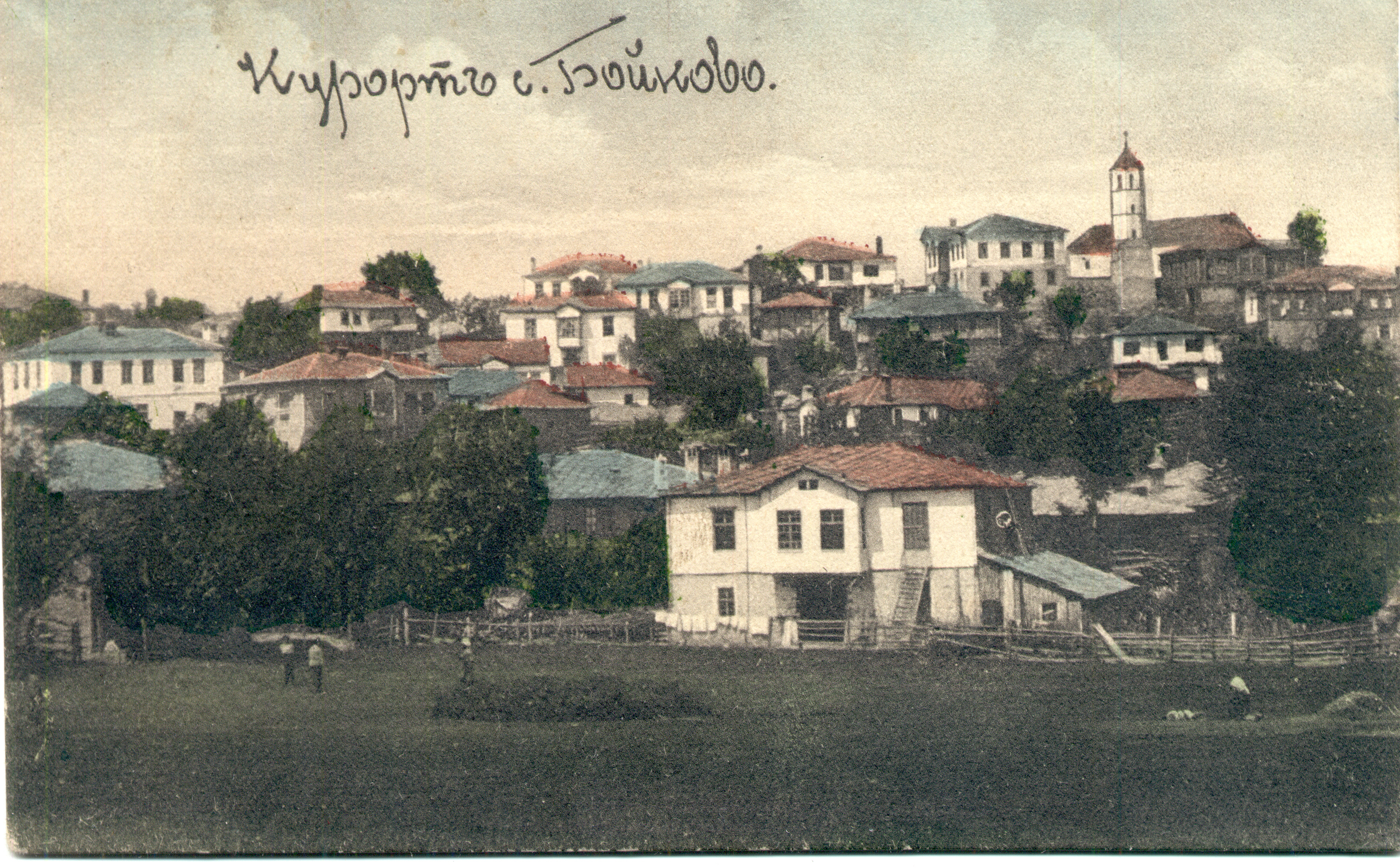 Пощенска картичка от началото на 20 век.